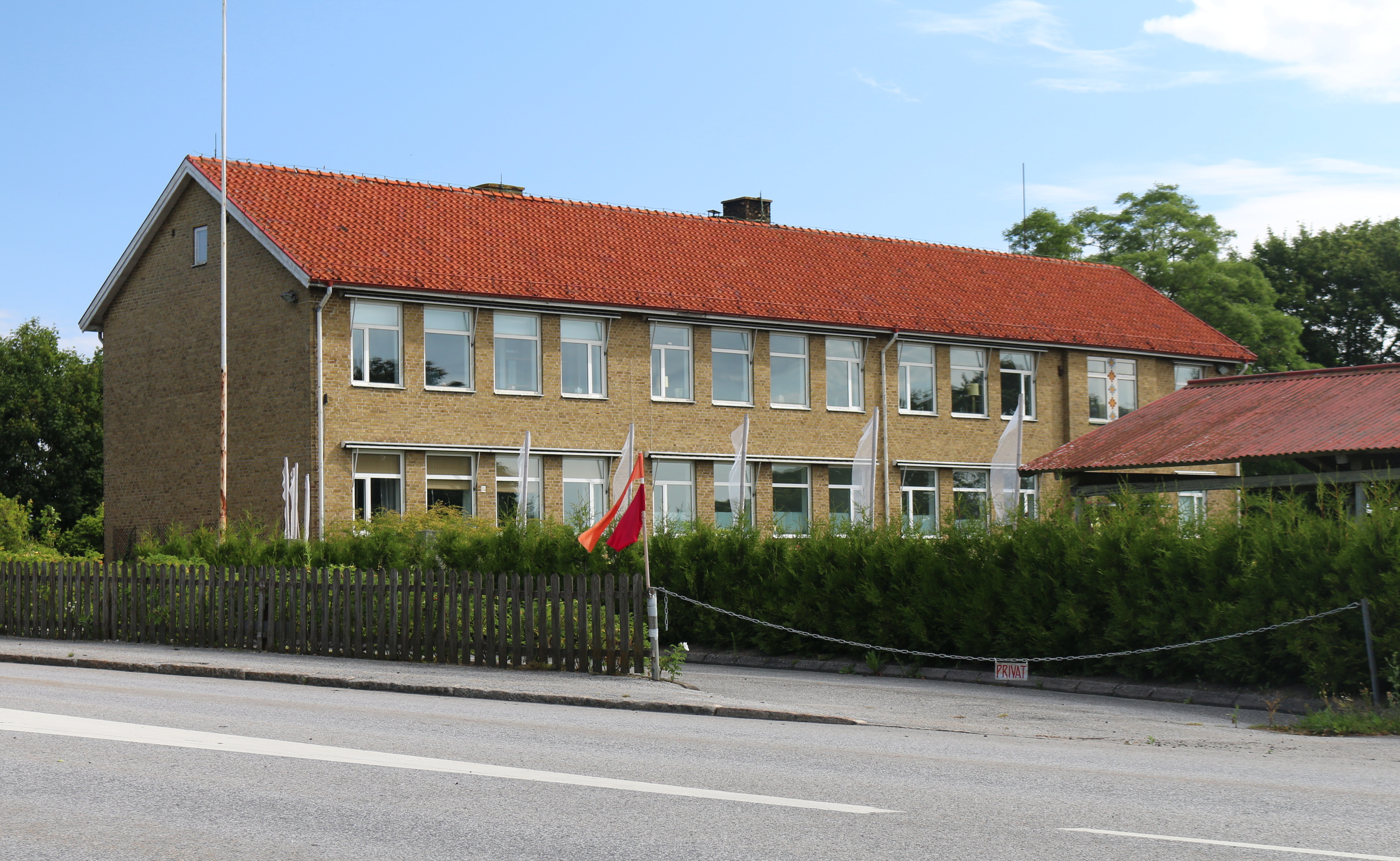 Östra Vemmerlövs nerlagda skola